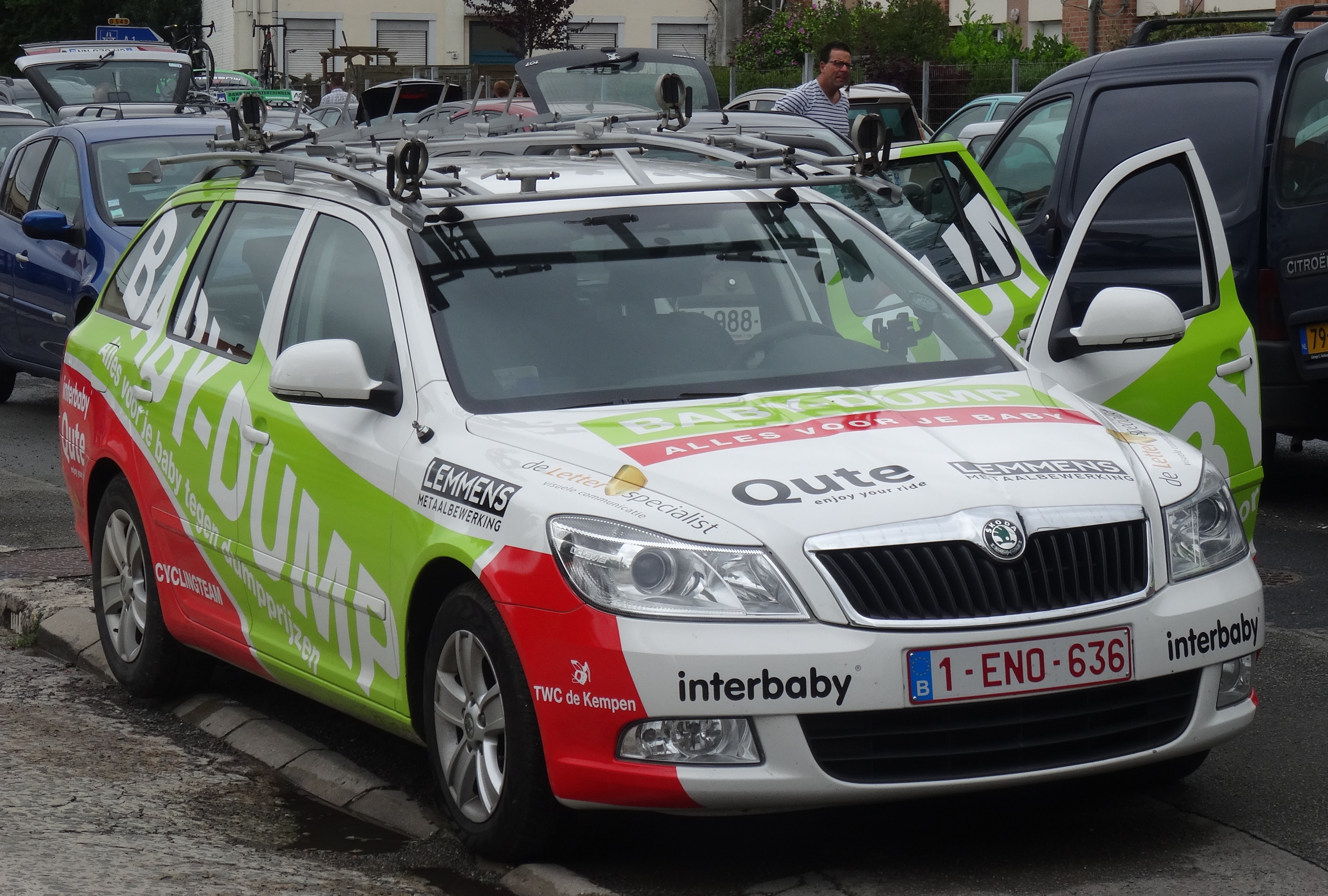 Reportage photographique réalisé le dimanche 13 juillet à l'occasion du départ et de l'arrivée de la Ronde pévéloise 2014 à Pont-à-Marcq, Nord-Pas-de-Calais, France.